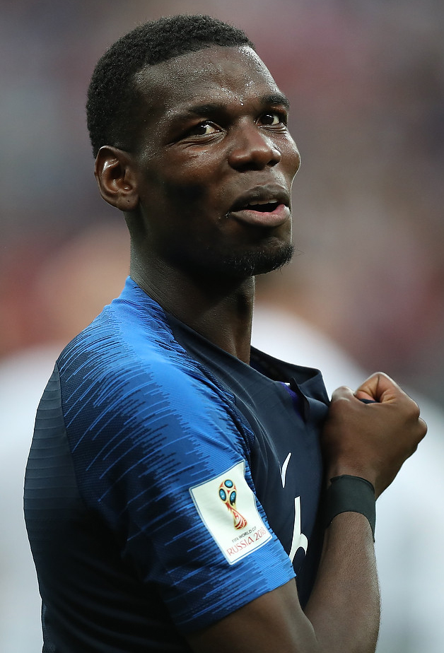 Франция - чемпион! Дождливая церемония награждения в «Лужниках»